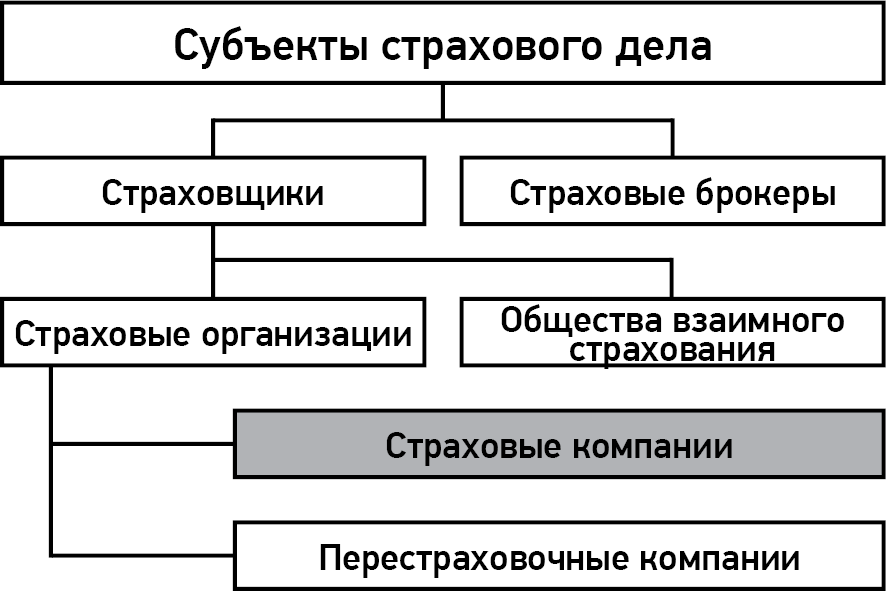 Содержит диаграмма субъектов страхового рынка, выделена страховая компания